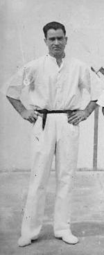 Ignacio Cortabitarte in 1941